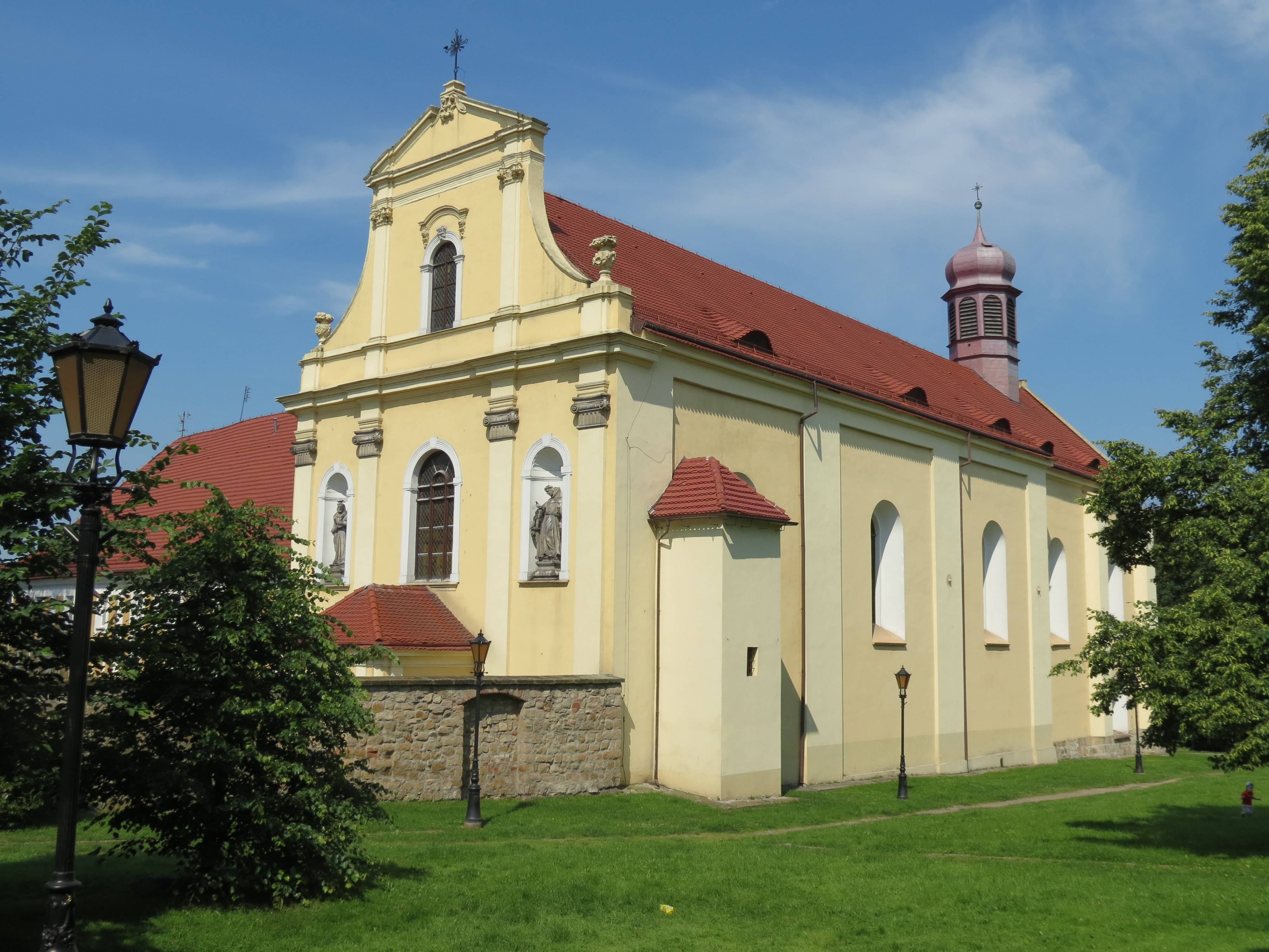 Złotoryja, kościół p.w. św. Jadwigi, XV, XIX